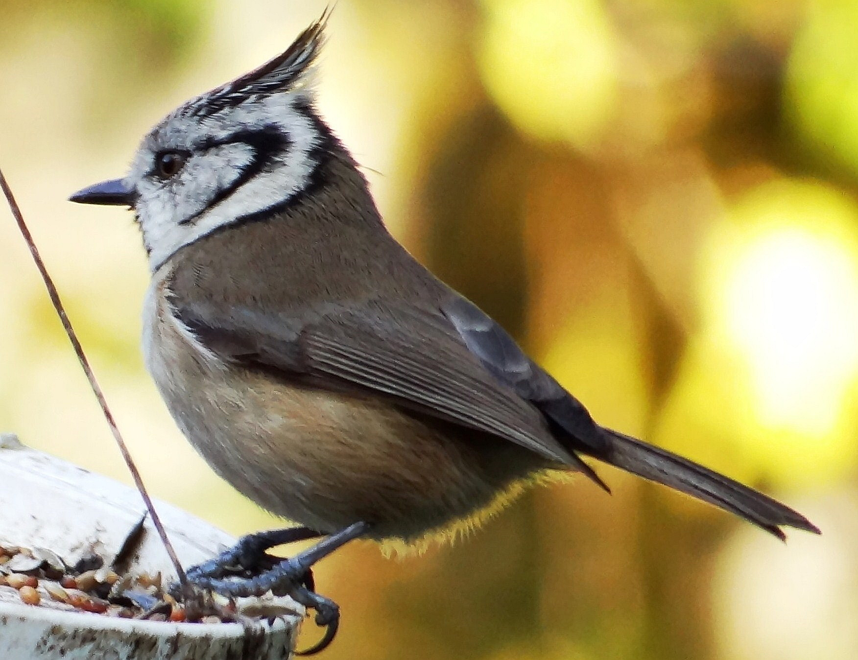 mesange huppée novembre 2011